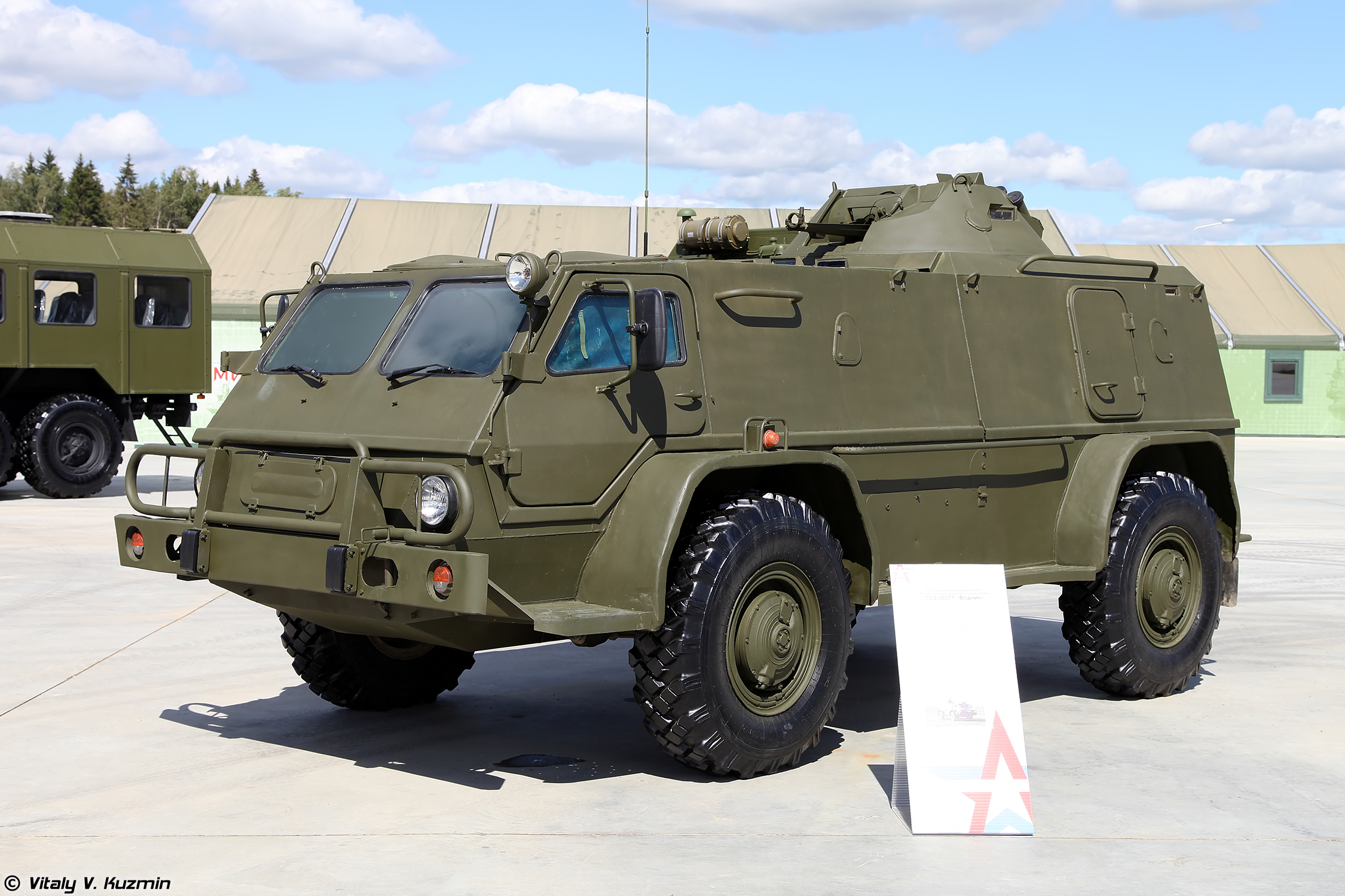 ГАЗ-39371 Водник (GAZ-39371 Vodnik)